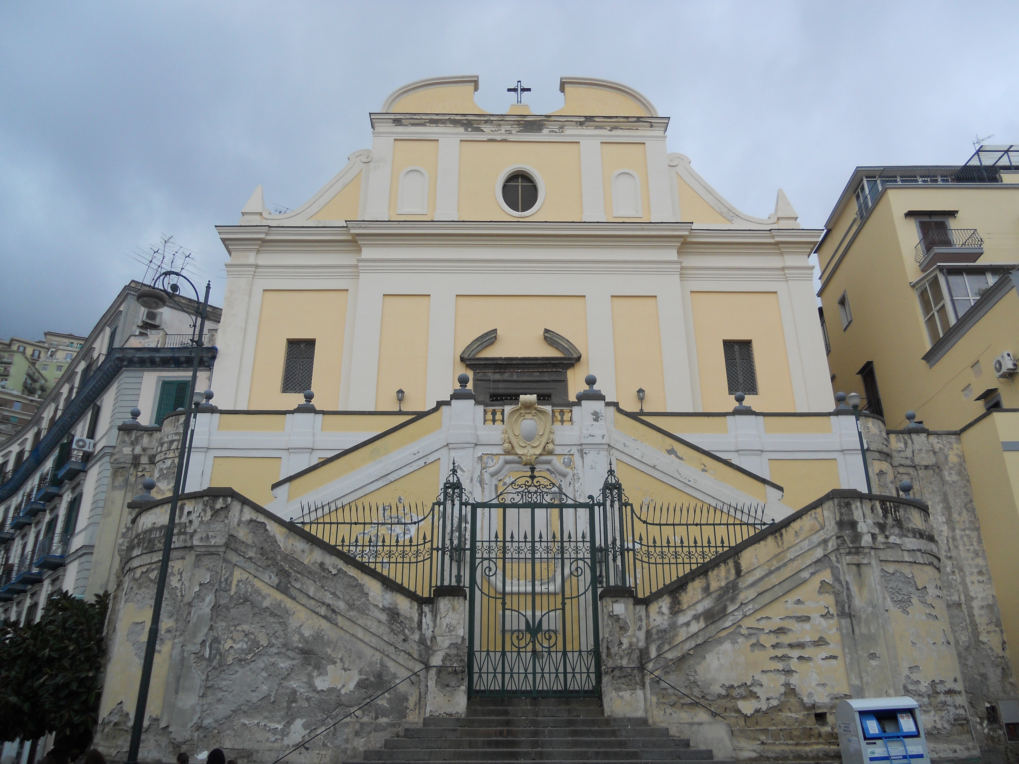 Chiesa di Santa Maria Apparente, Napoli